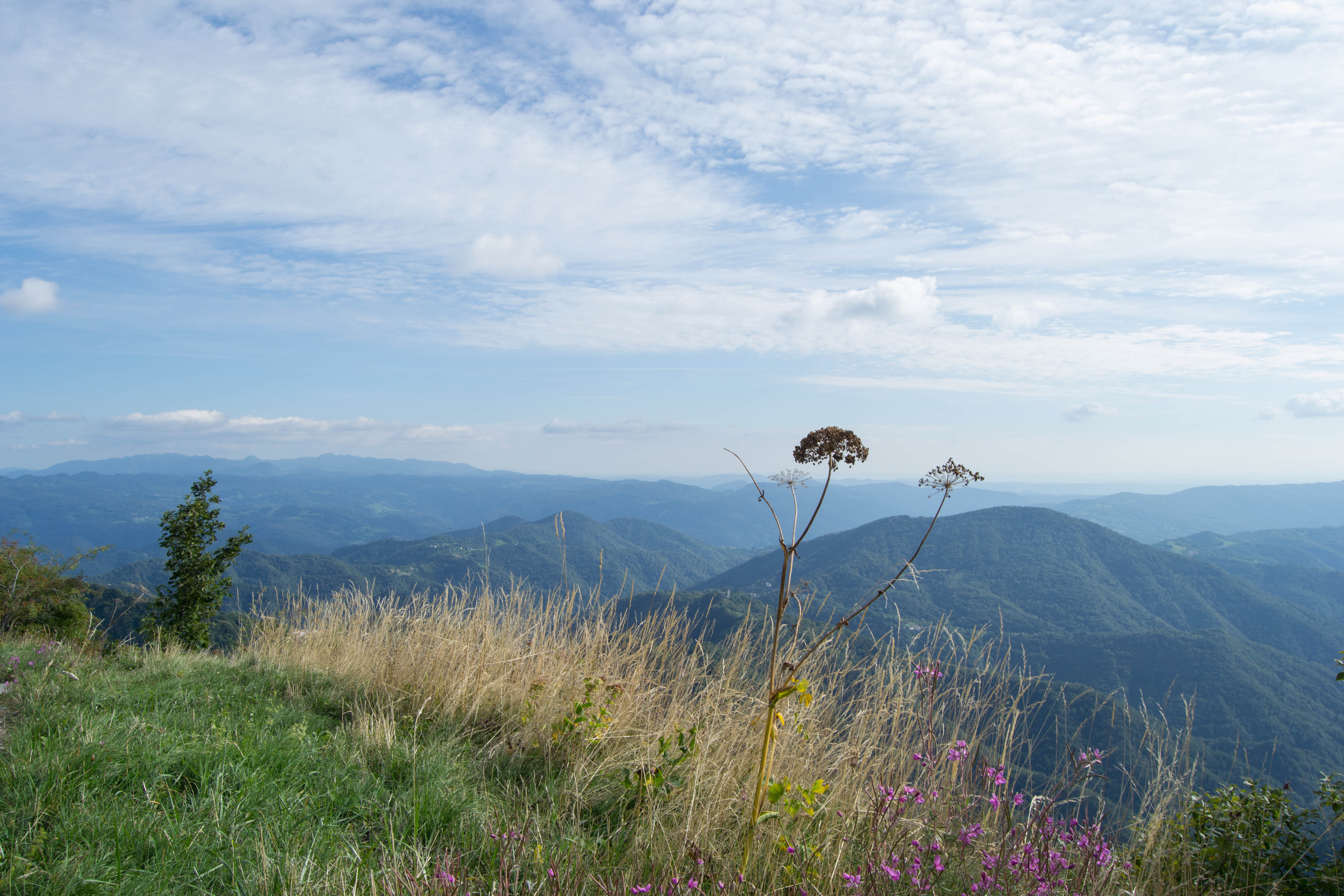 Tra cielo e terra